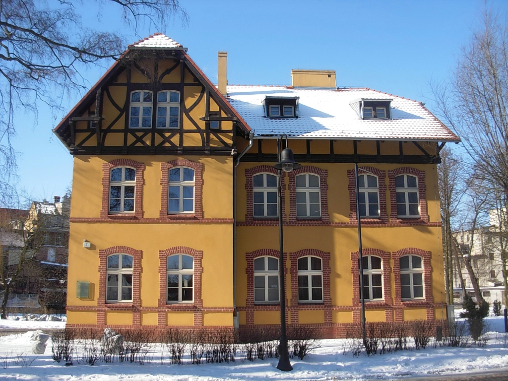 Muzeum Leona Wyczółkowskiego na Wyspie Młyńskiej